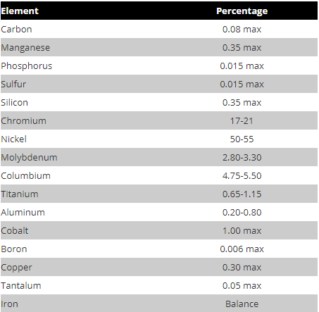 بیسسیی